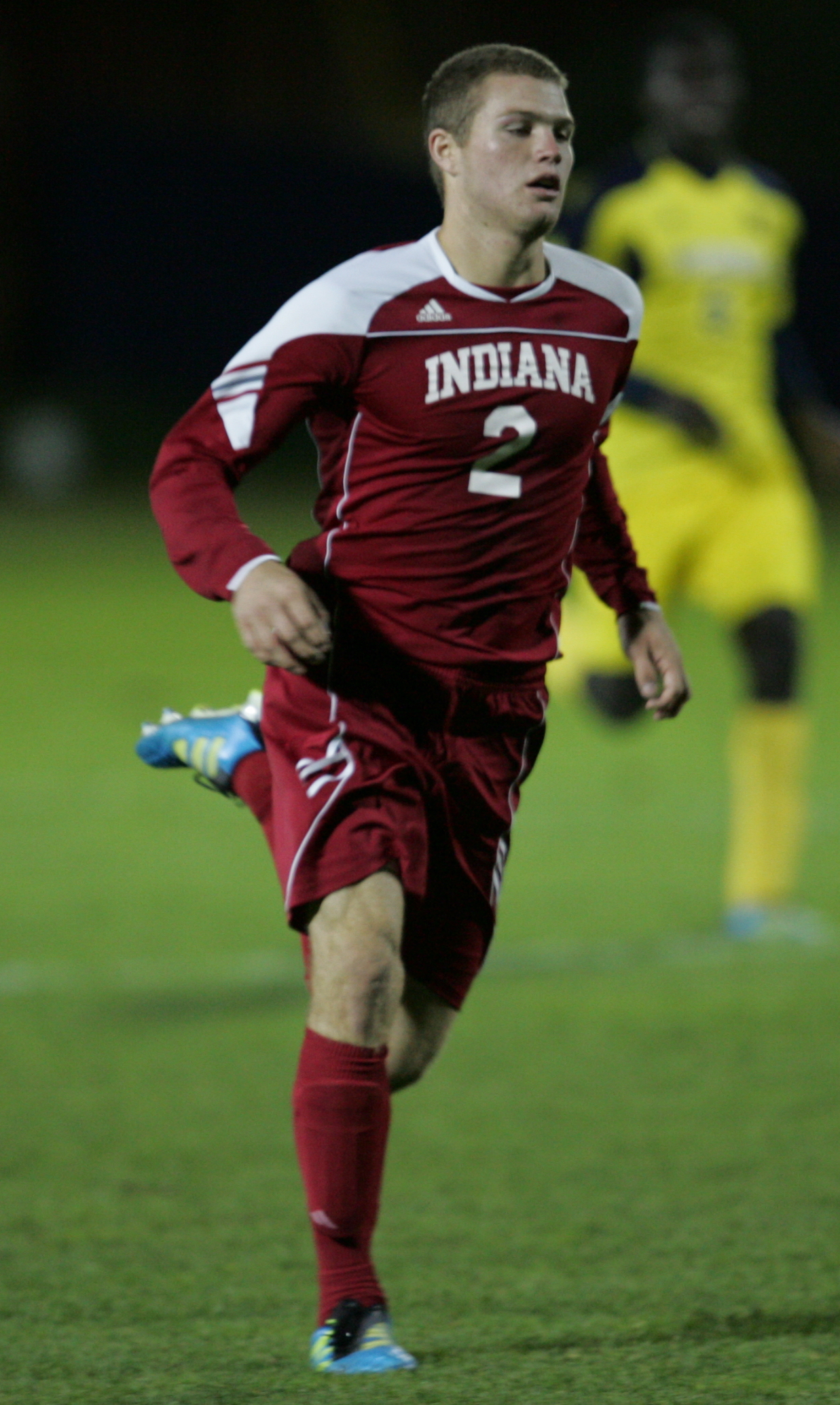 Michigan vs. Indiana